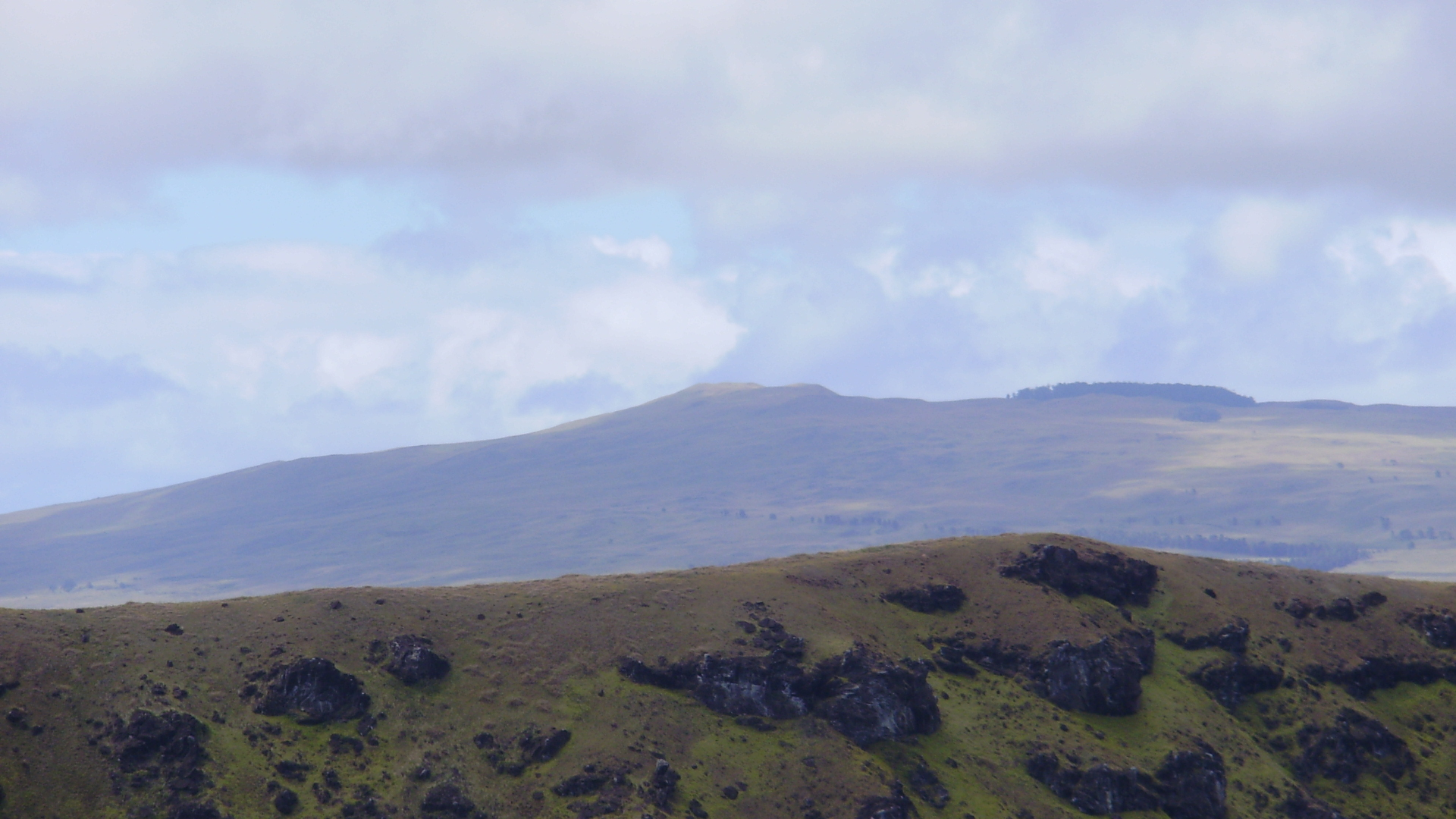 Volcán Maʻunga Terevaka, en Isla de Pascua, Chile.